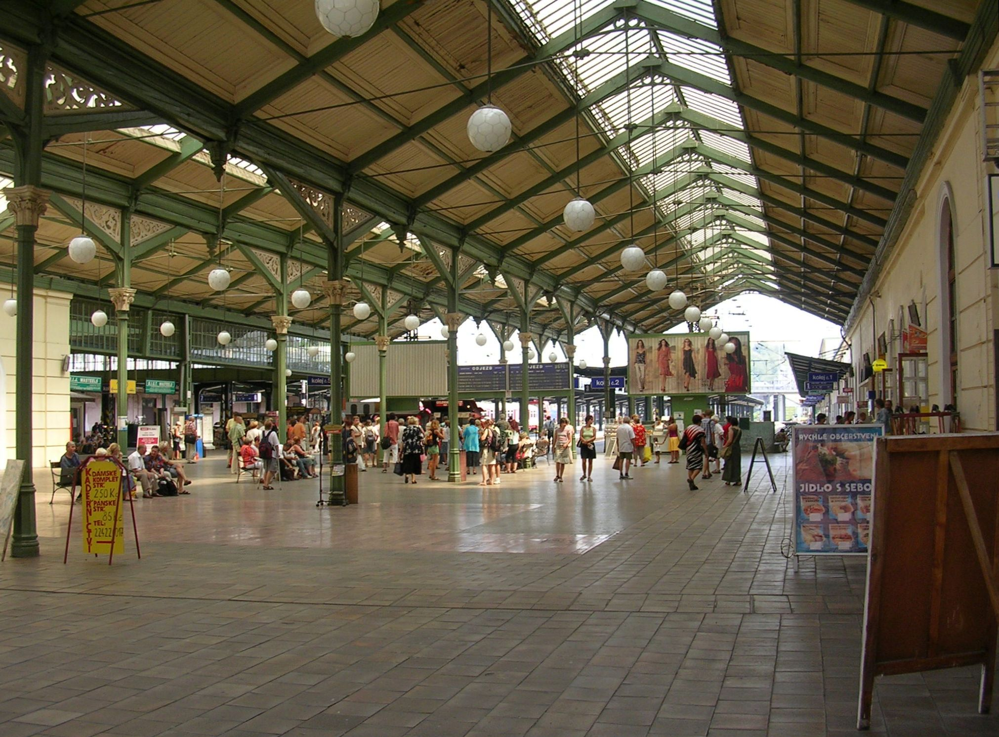 Masarykovo nádraží, hala v pohledu od Havlíčkovy ulice.